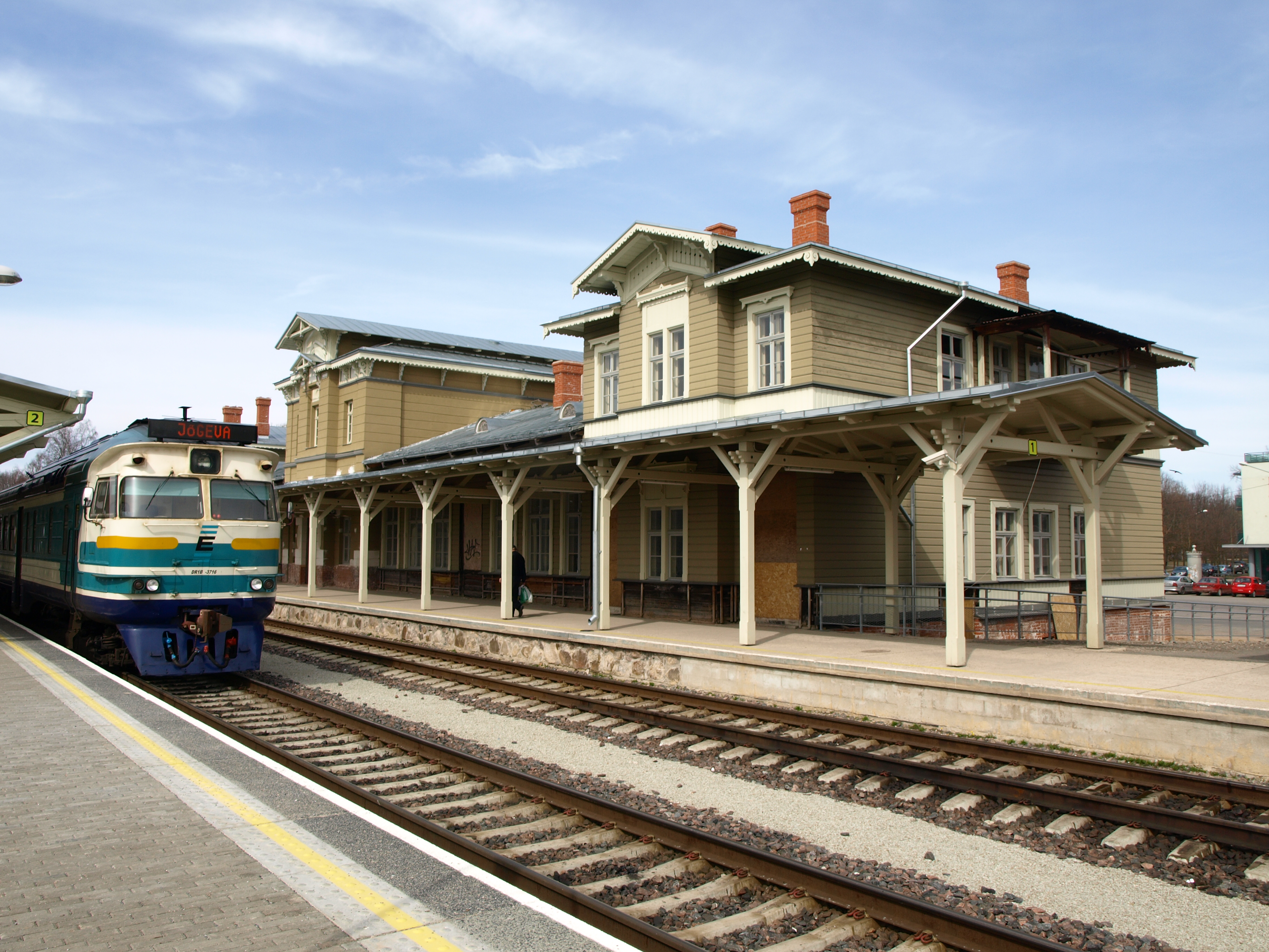 Tartu raudteejaama hoone Vaksali 6, 1876-1878.a.